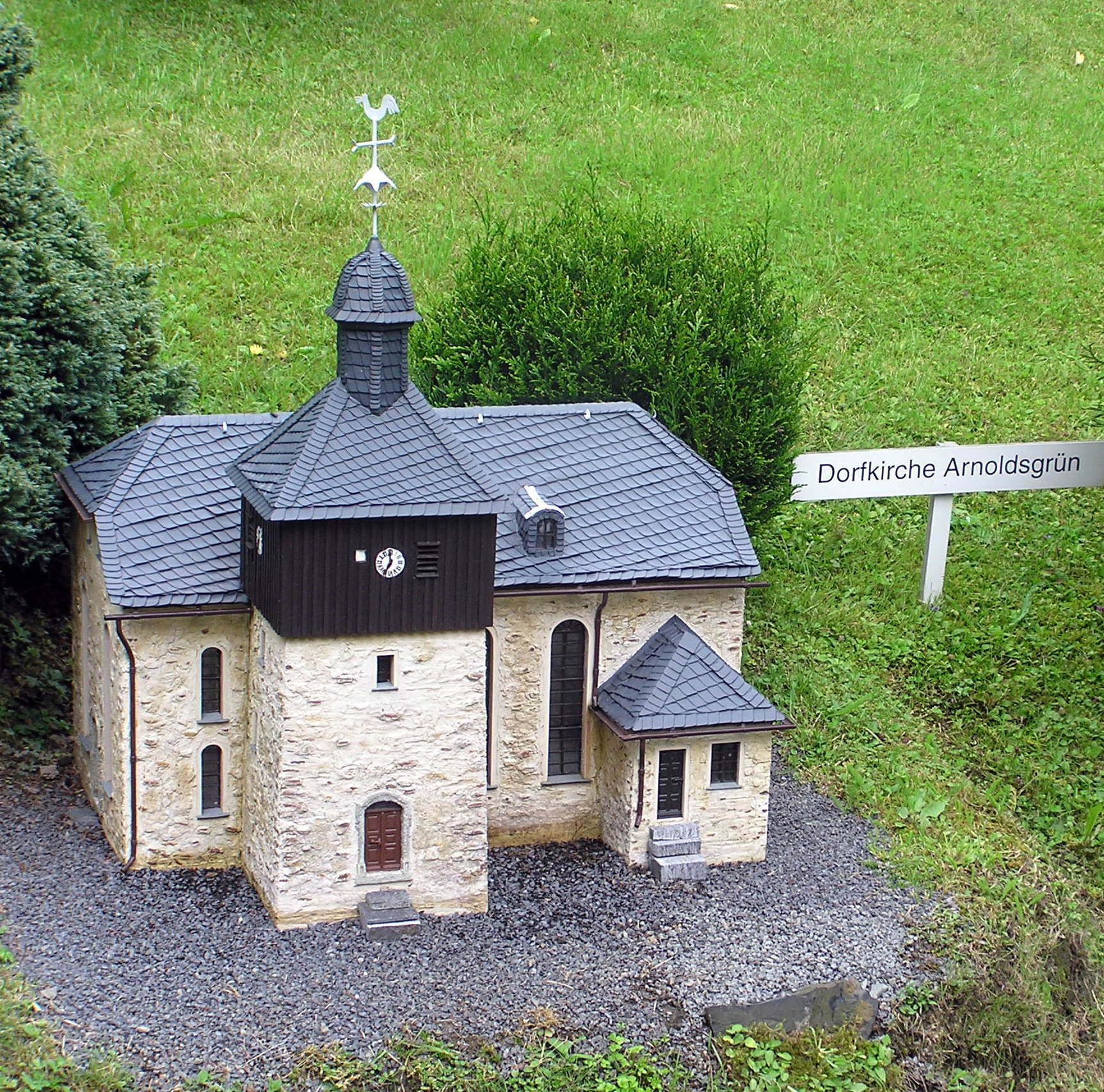 Miniatur-Schauanlage Klein-Vogtland in Adorf, Dorfkirche Arnoldsgrün